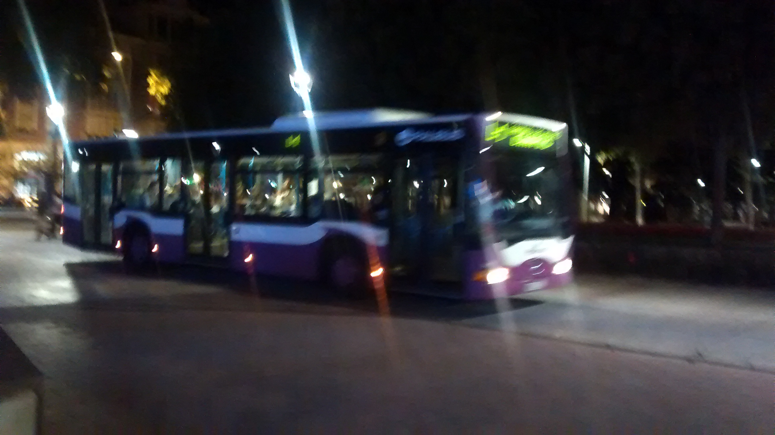 Un autobús en el parque de Isabel II